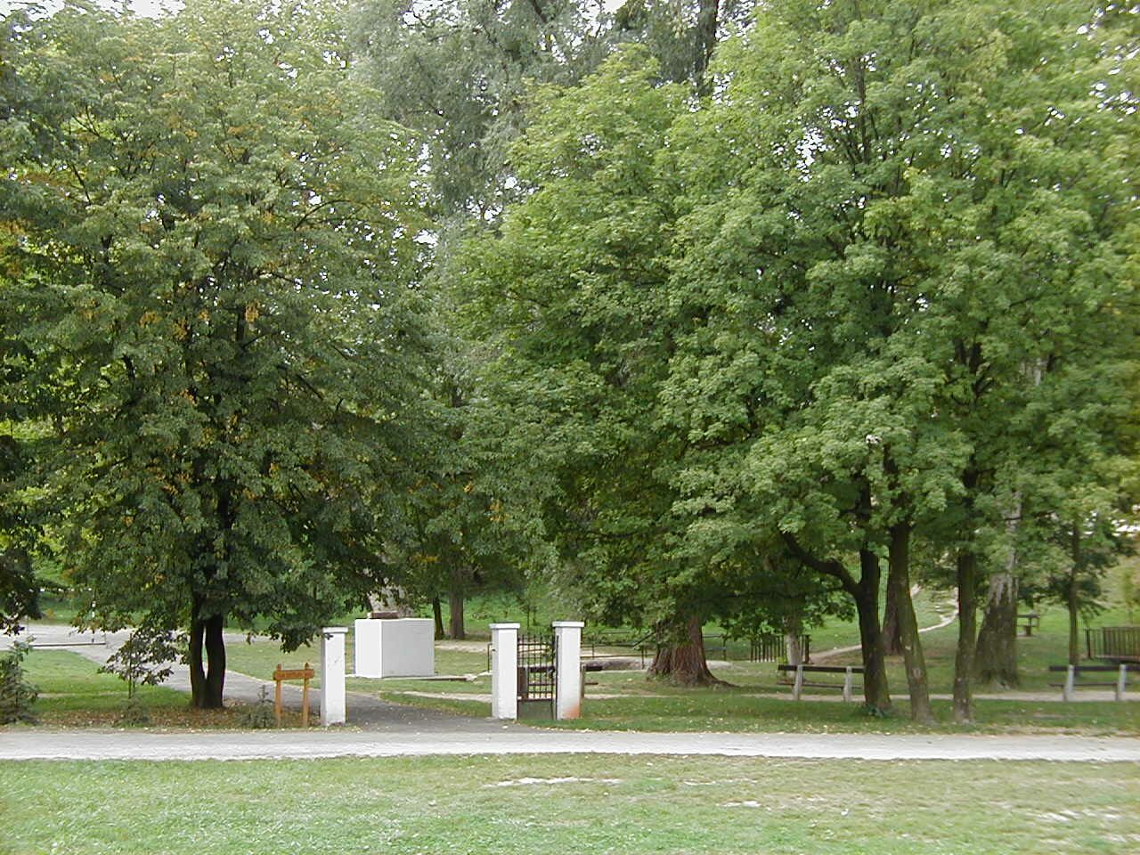 Bakonyszentlászló Vak Bottyán park